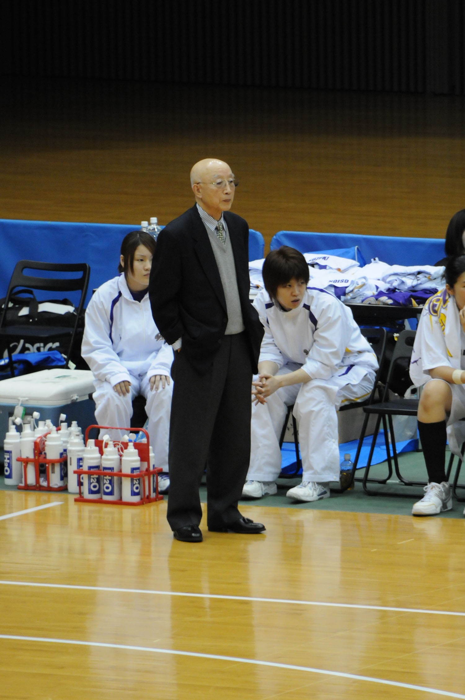 アイシンAWウィングスの金平鈺ヘッドコーチ。とどろきアリーナで。